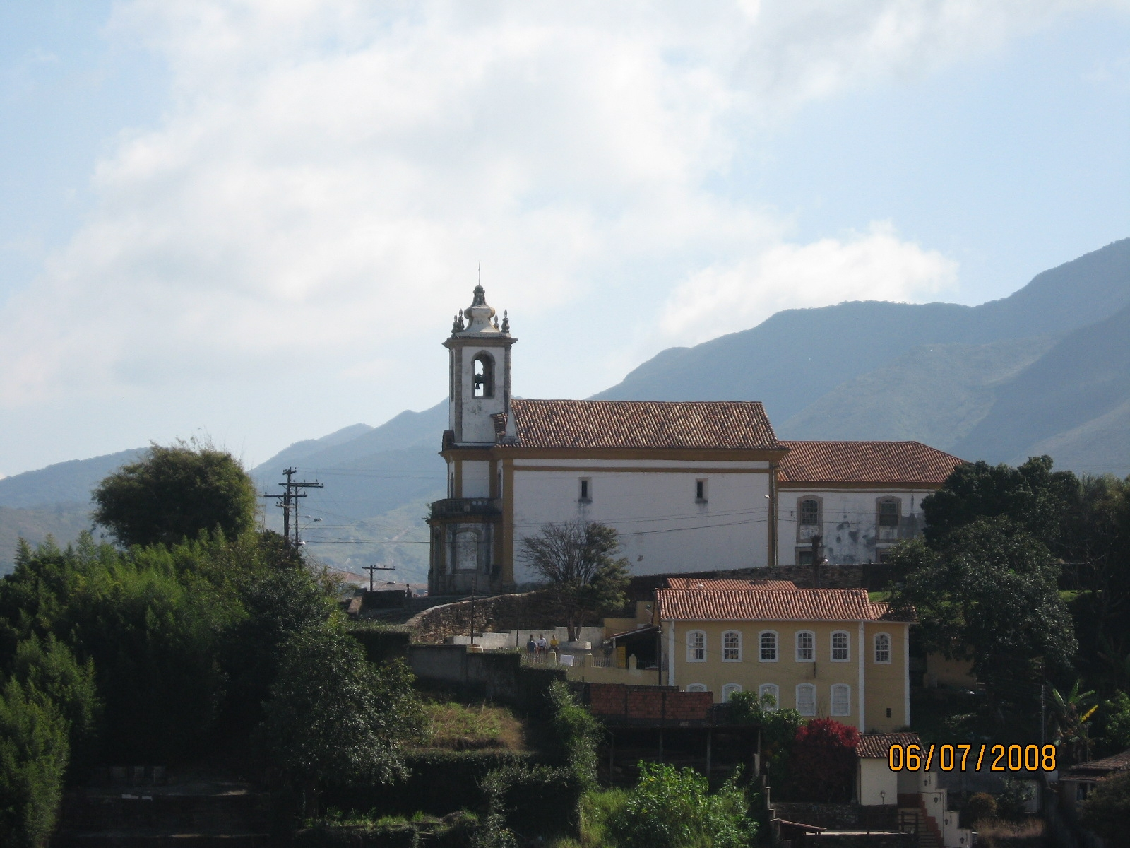 Igreja de São Jose Ouro Preto Minas Gerais